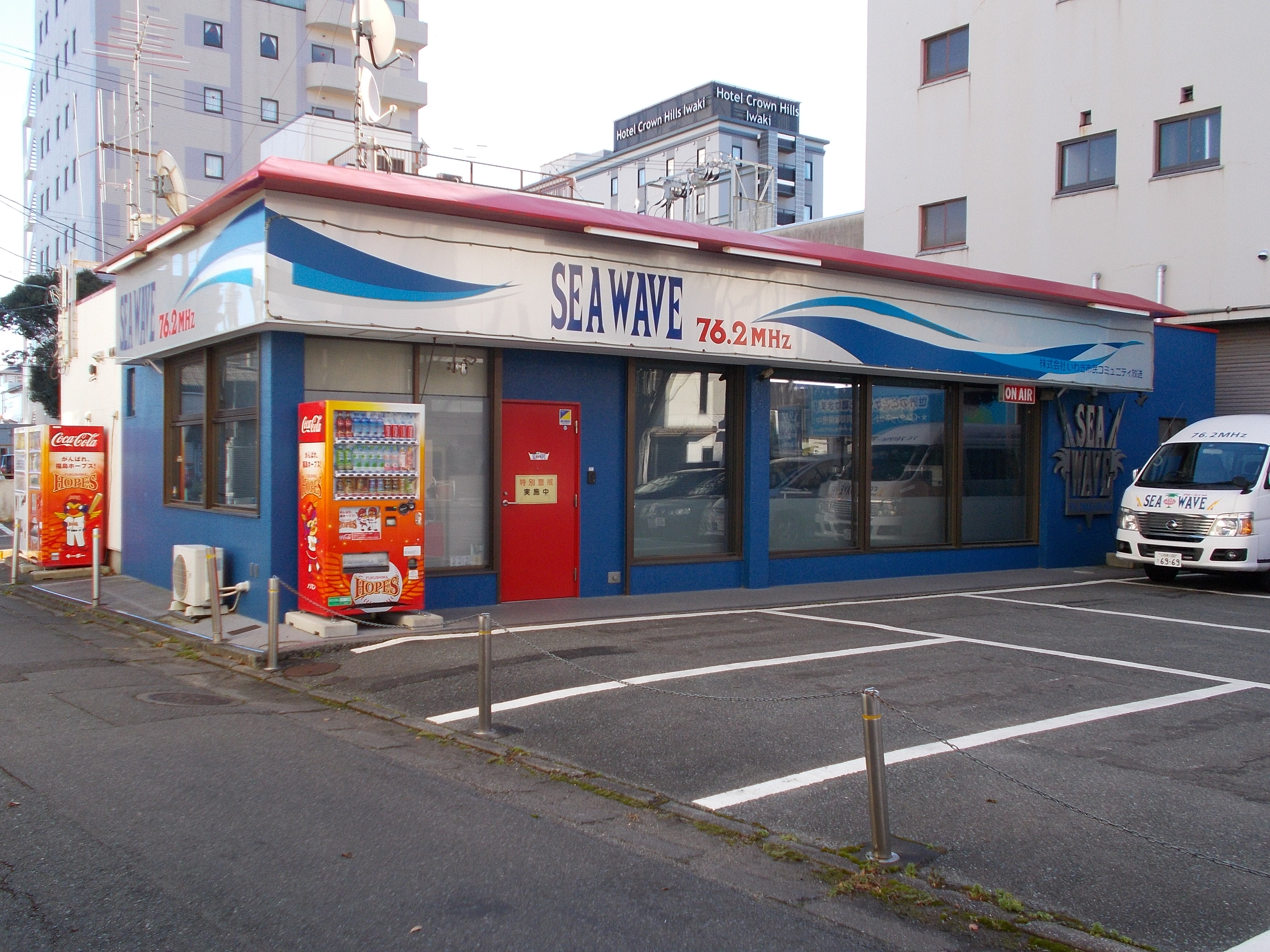 いわき市民コミュニティ放送本社演奏所